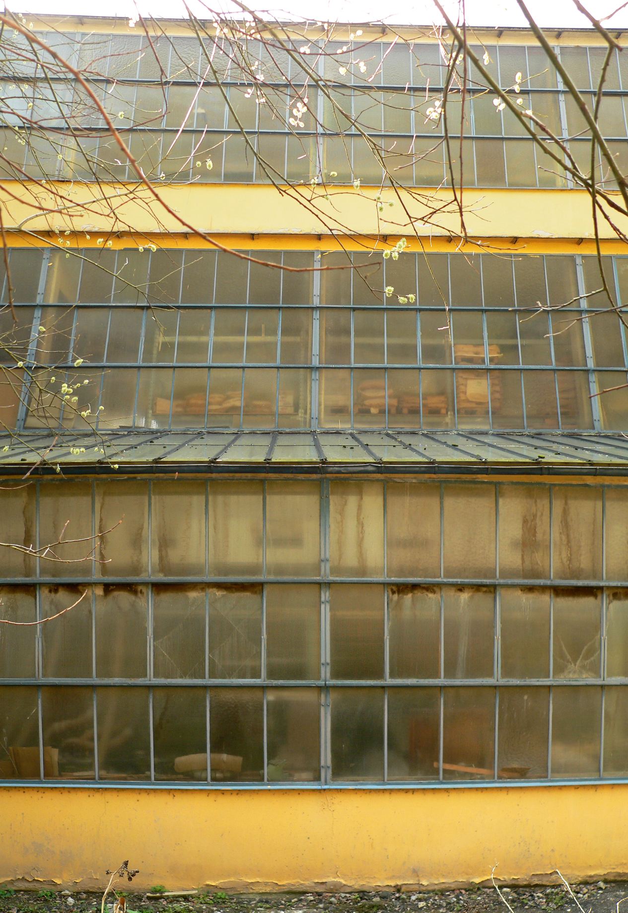 AMCO-Fabrikerweiterungsgebäude, Fensterbänder auf der Ostseite